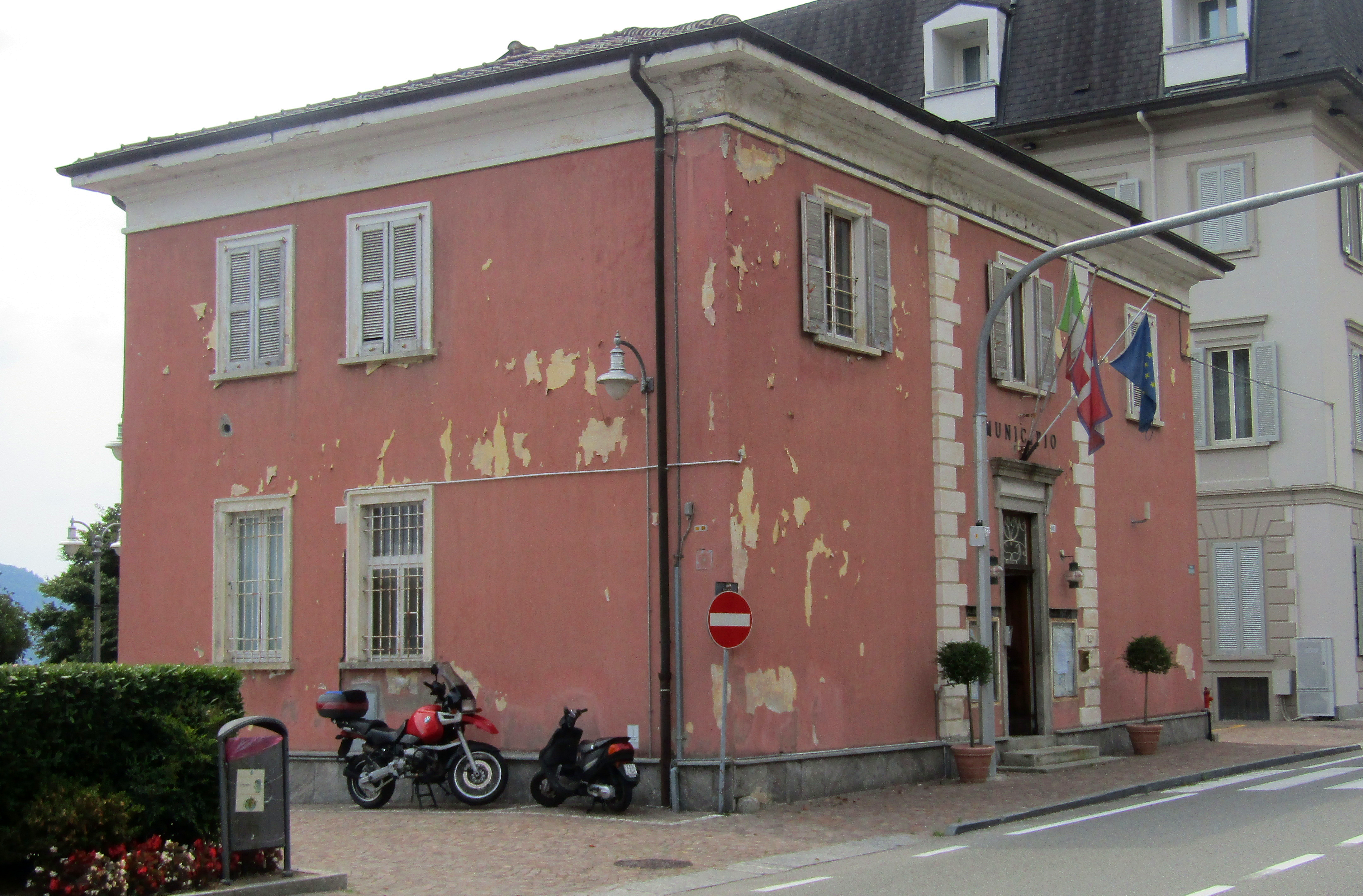 Il municipio di Ghiffa (VB)